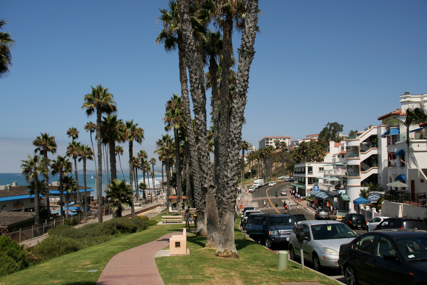 Blick über den Parque del Mar in Downtown San Clemente, Kalifornien.